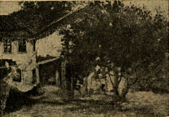 Pintura de Ernesto Quissak executada em 1922, de uma casa de fazenda com uma árvore à frente. Participou da Exposição Geral de Belas Artes de 1922, no Rio de Janeiro. Publicada na Revista Fon-Fon em 28 de outubro de 1922.